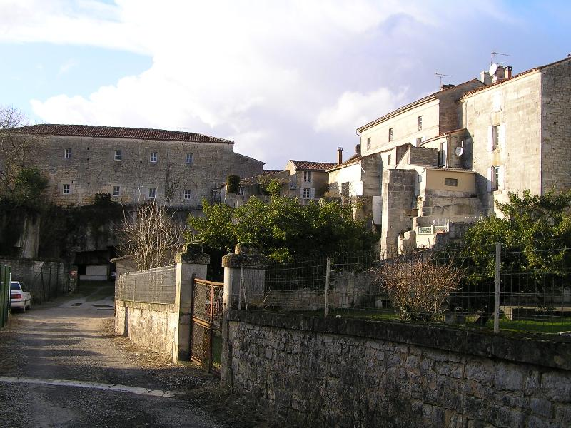 Carrières et maisons à Saint Même les carrières